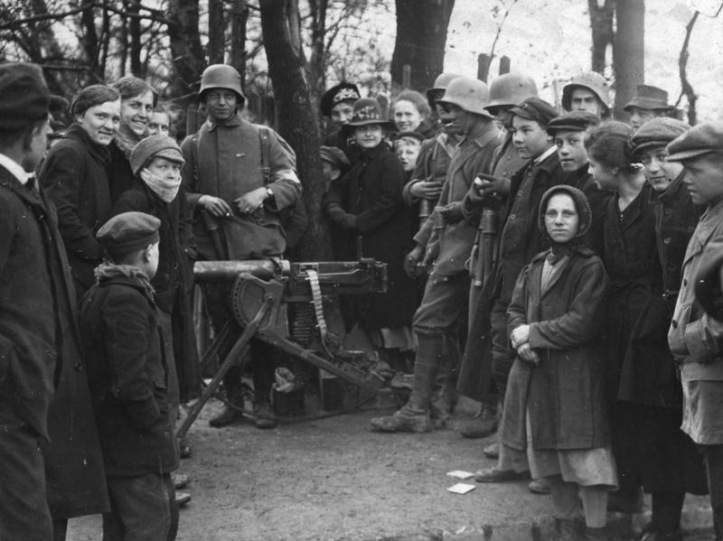 Maschinengewehr in den Strassen Münchens Mai 1919 [Rückseite:]Befreiung Münchens